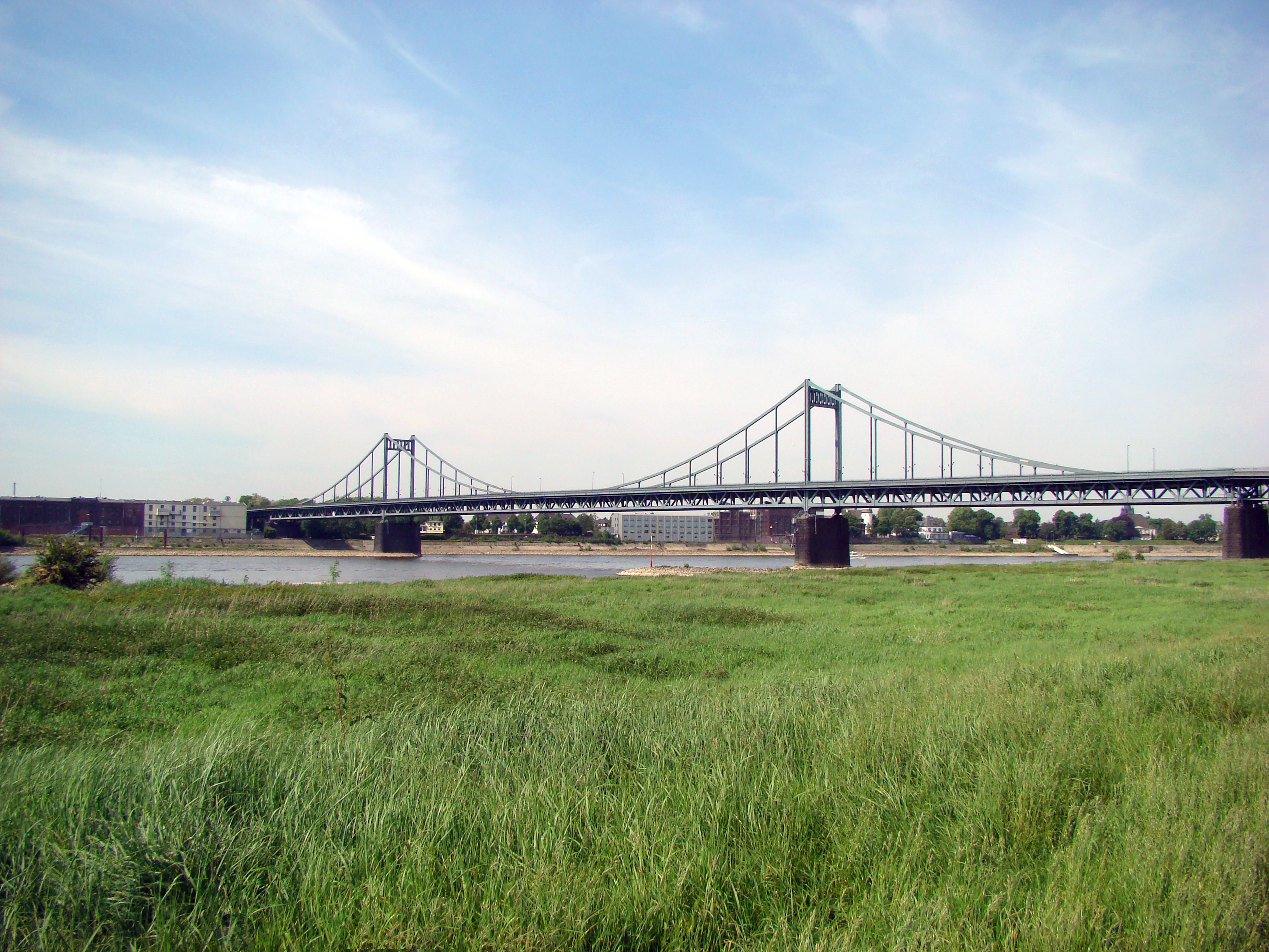 Die Krefeld-Uerdinger Rheinbrücke.